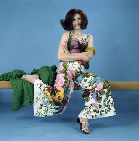 Iva Zanicchi posa per un servizio fotografico nei primi anni '60.